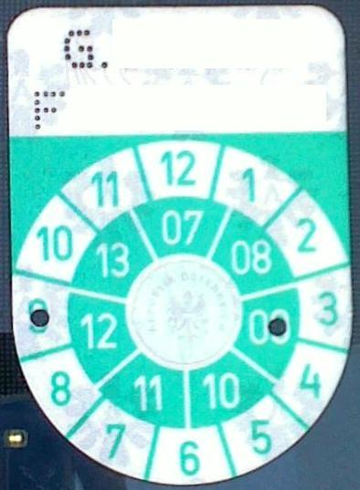 Begutachtungsplakette in Österreich in grün